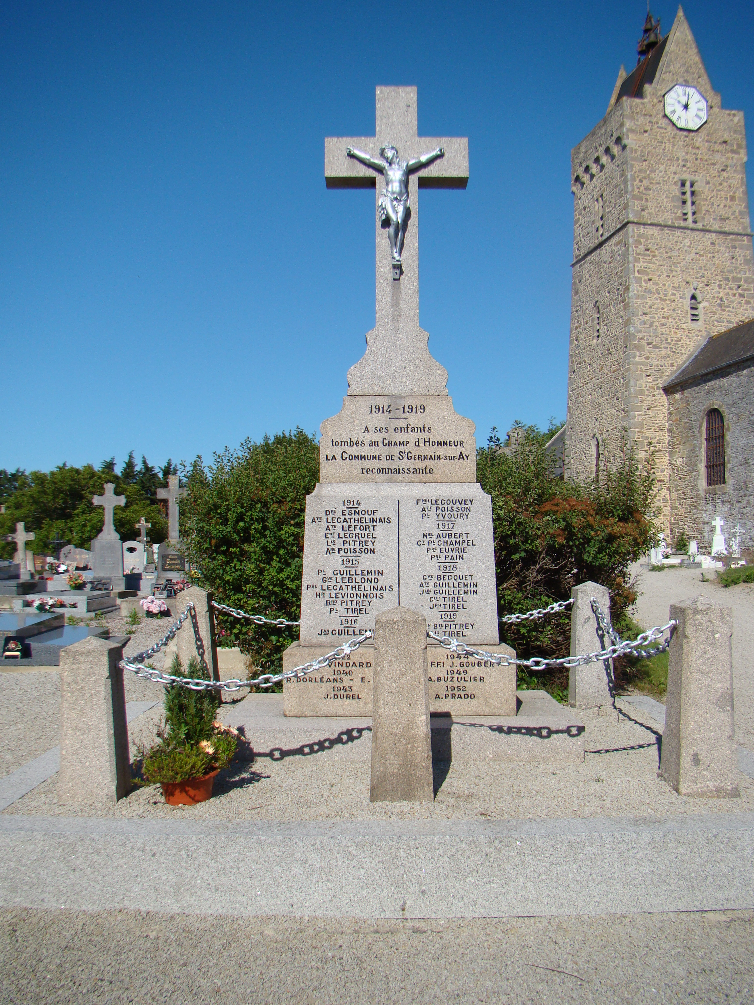 Monument aux morts pour la France Saint-Germain-sur-Ay